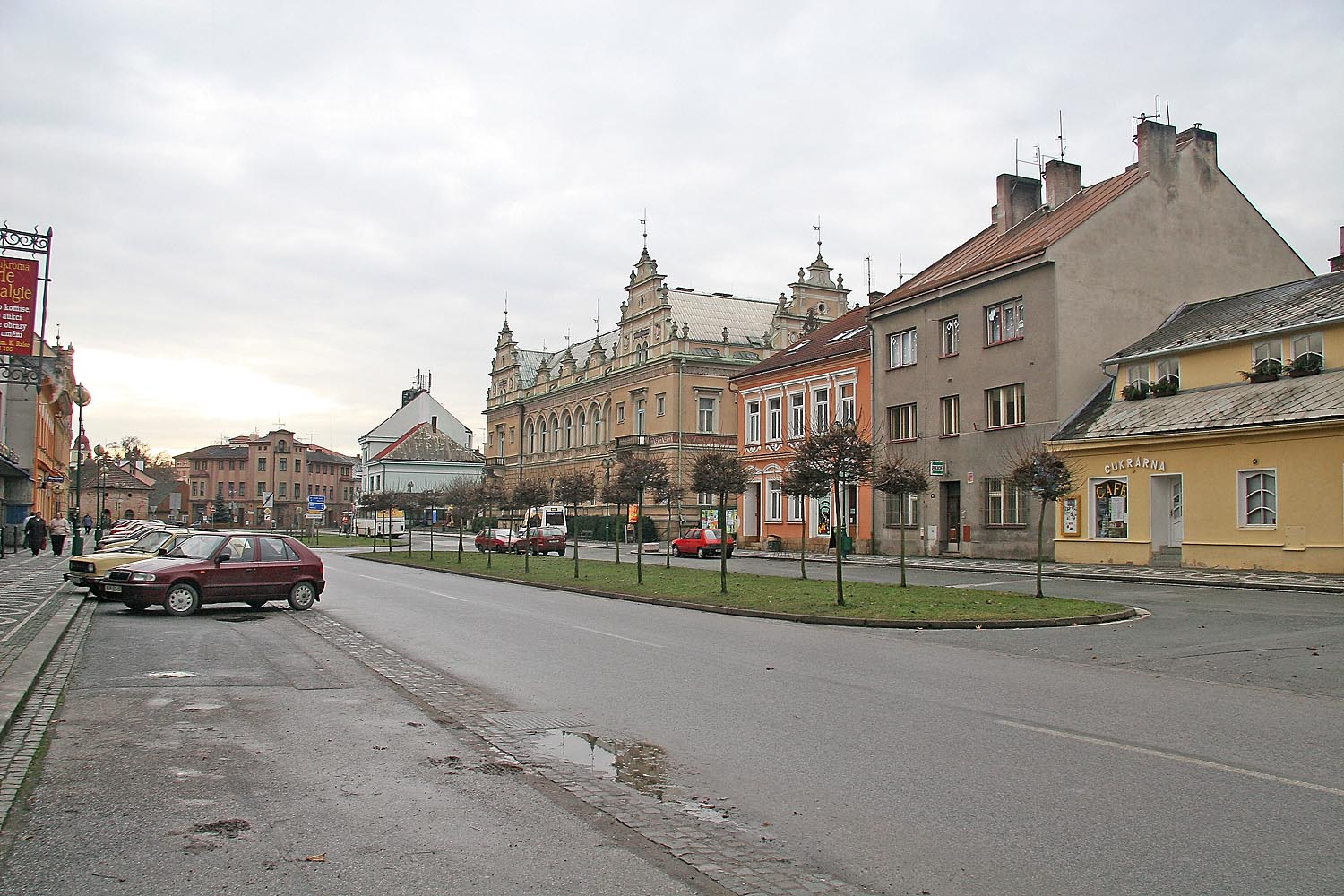 Lázně Bělohrad, okres Jičín. Náměstí K. V. Raise